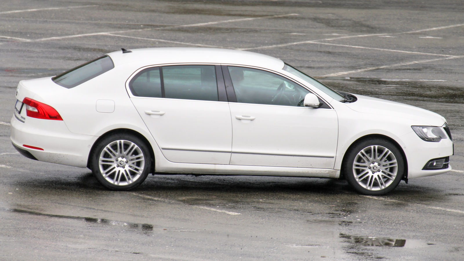 Škoda Superb II (facelift 2013)